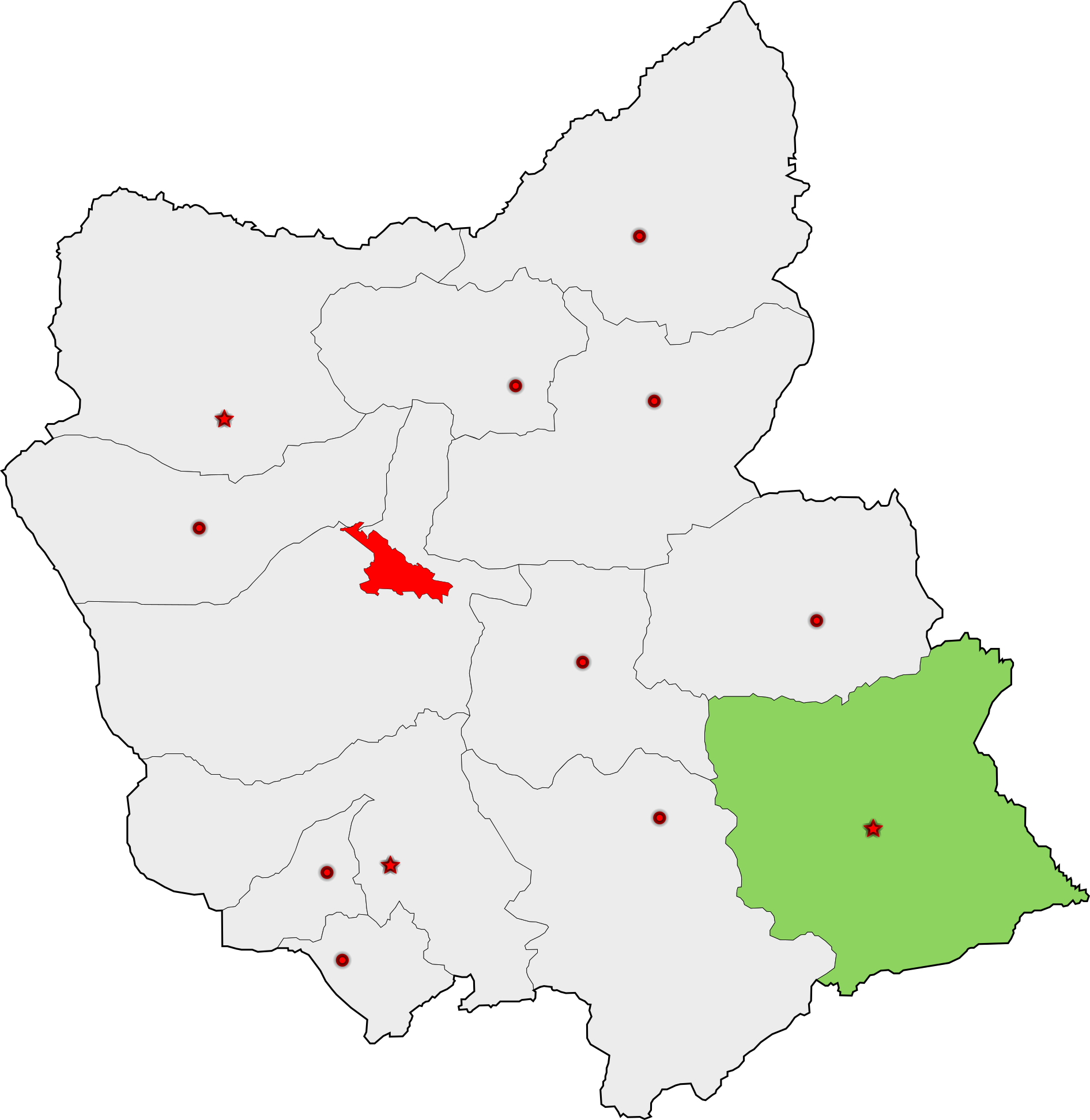 حوزهٔ انتخاباتی میانه برای انتخابات مجلس شورای اسلامی